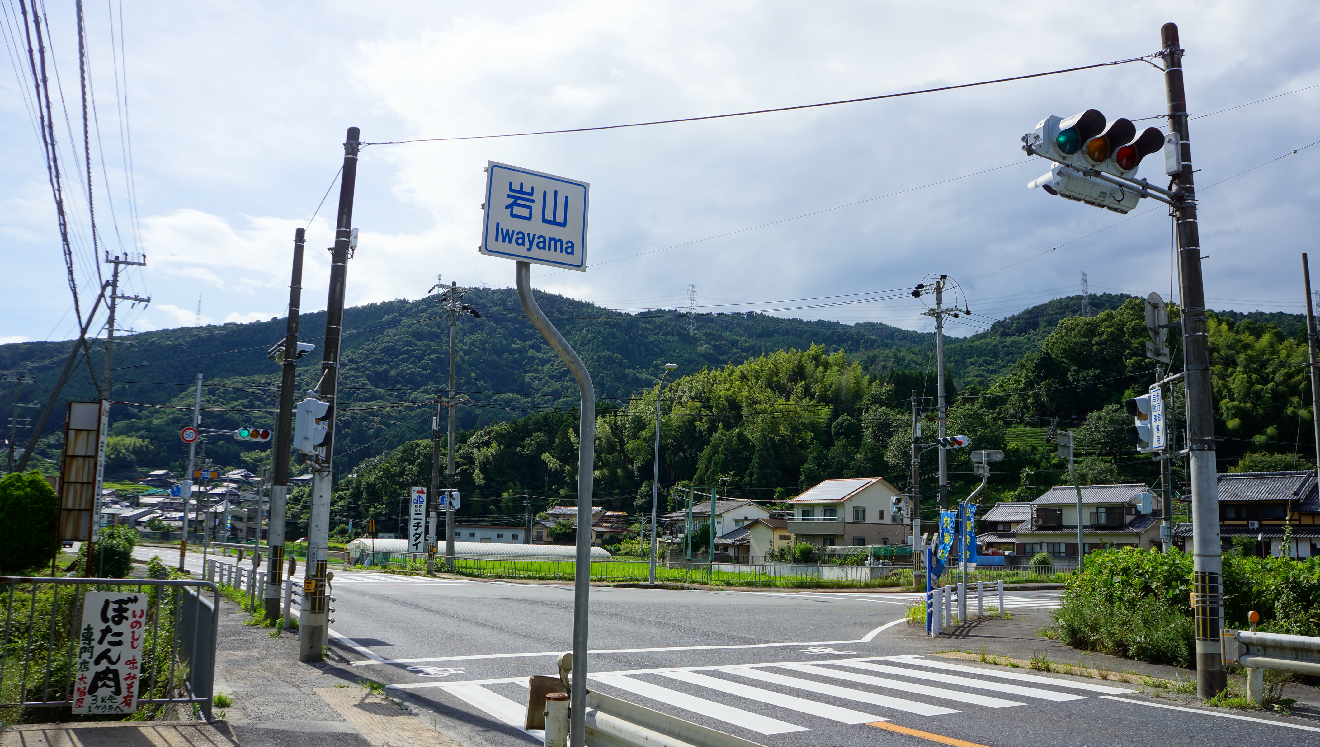 京都府道783号・国道307号線合流交差点 12年7月15日撮影